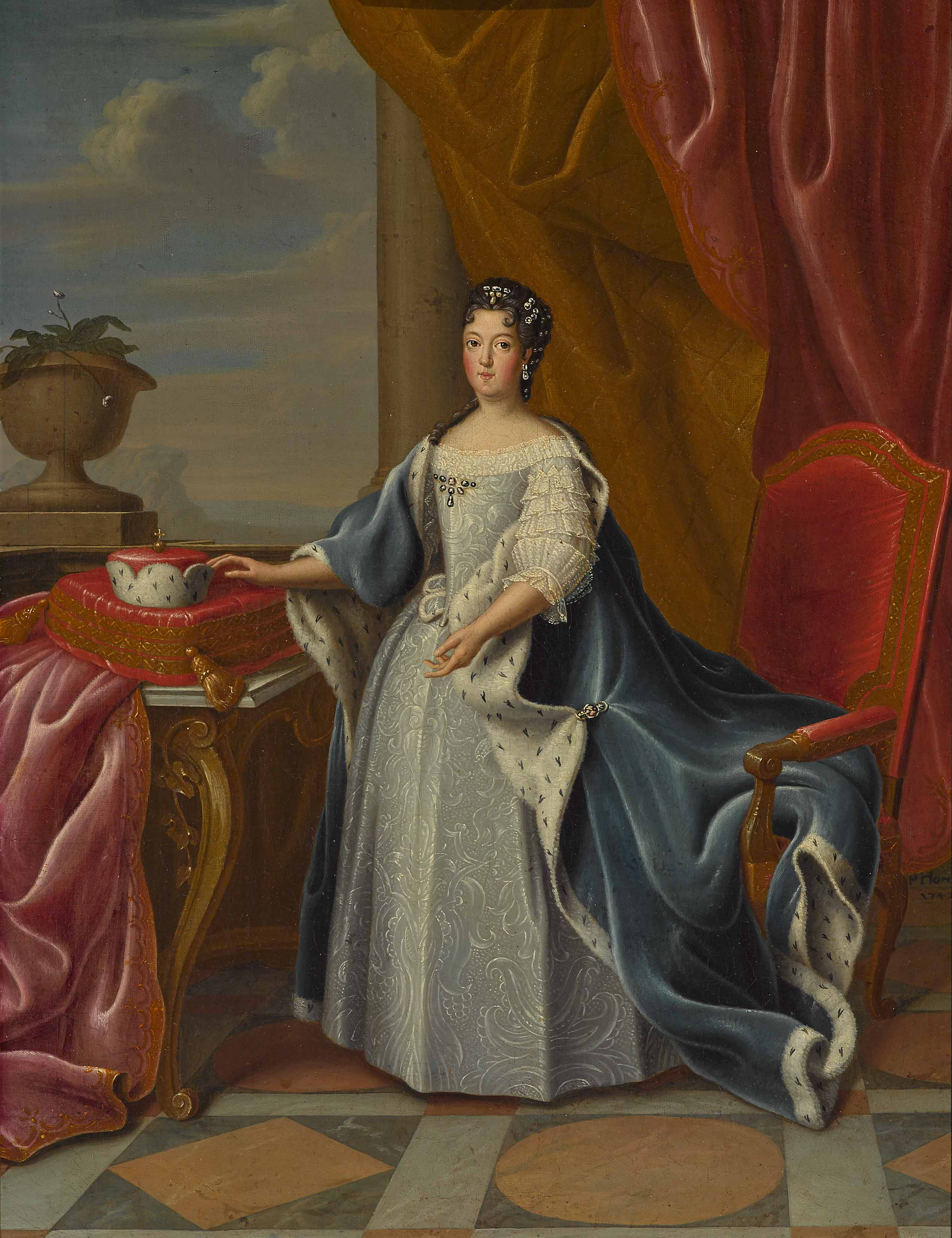 Kurfürstin Therese Kunigunde von Bayern (1676-1730)